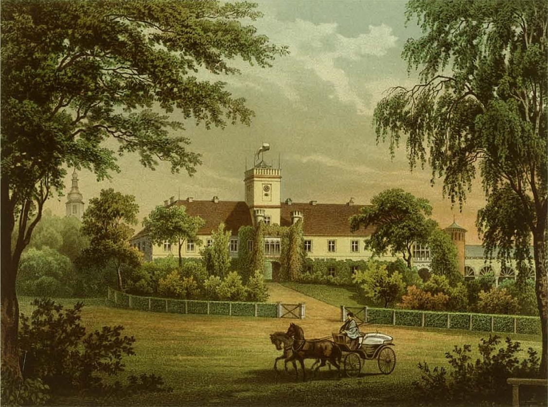 Schloss Dambrau, Kreis Falkenberg